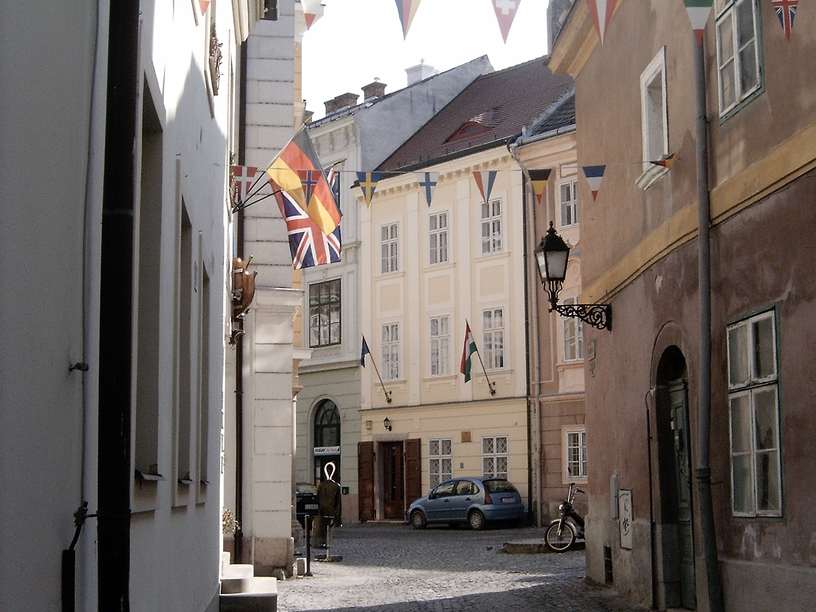 A győri Sarkantyú köz (Győr-Moson-Sopron megye)